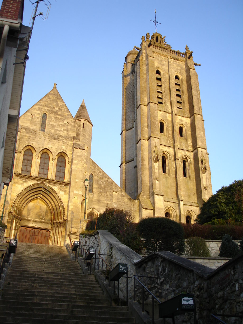 Façade de l'église Saint-Laurent - Beaumont-sur-Oise (France)